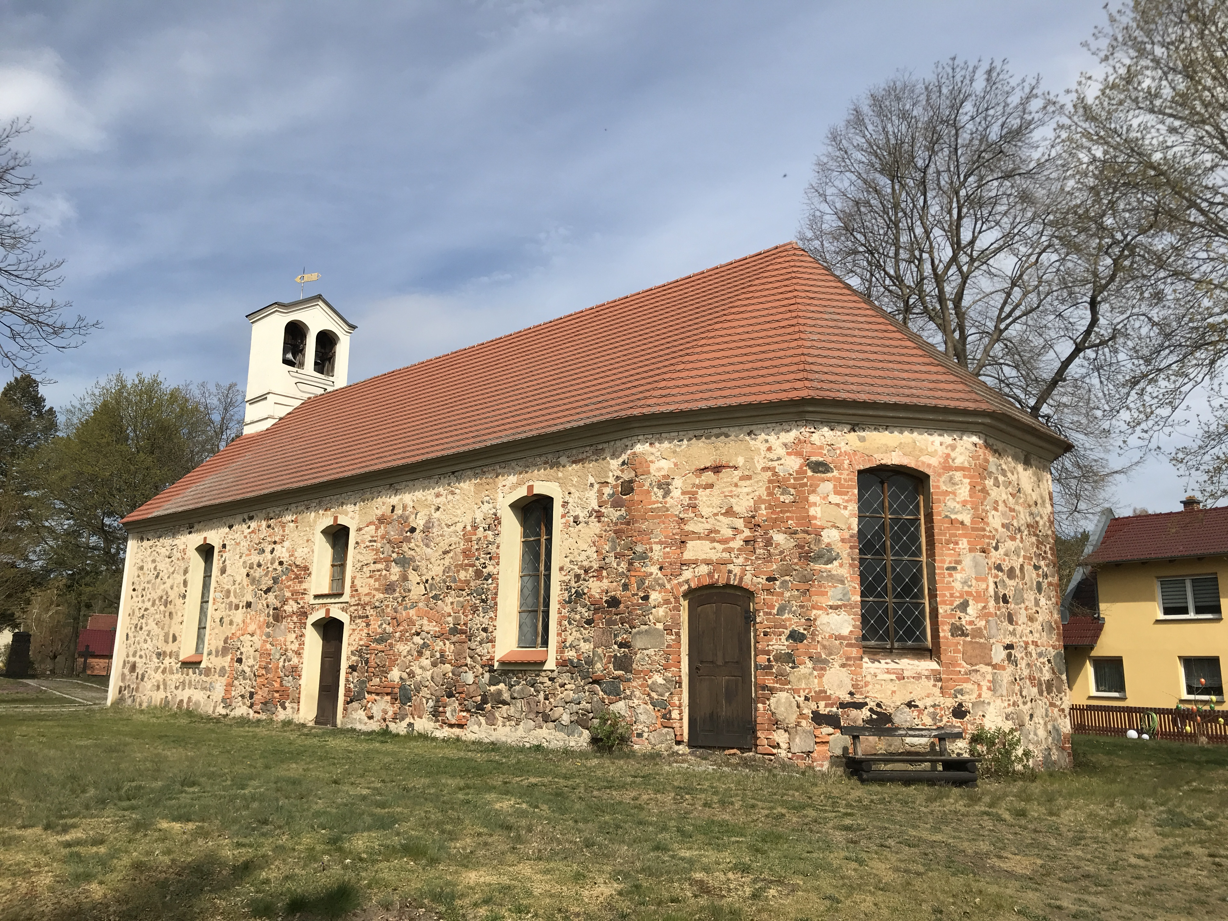 Die Dorfkirche Wüstenhain ist eine Saalkirche aus den 1860er Jahren in Wüstenhain, einem Gemeindeteil des Ortsteils Laasow der Stadt Vetschau/Spreewald im Landkreis Oberspreewald-Lausitz.